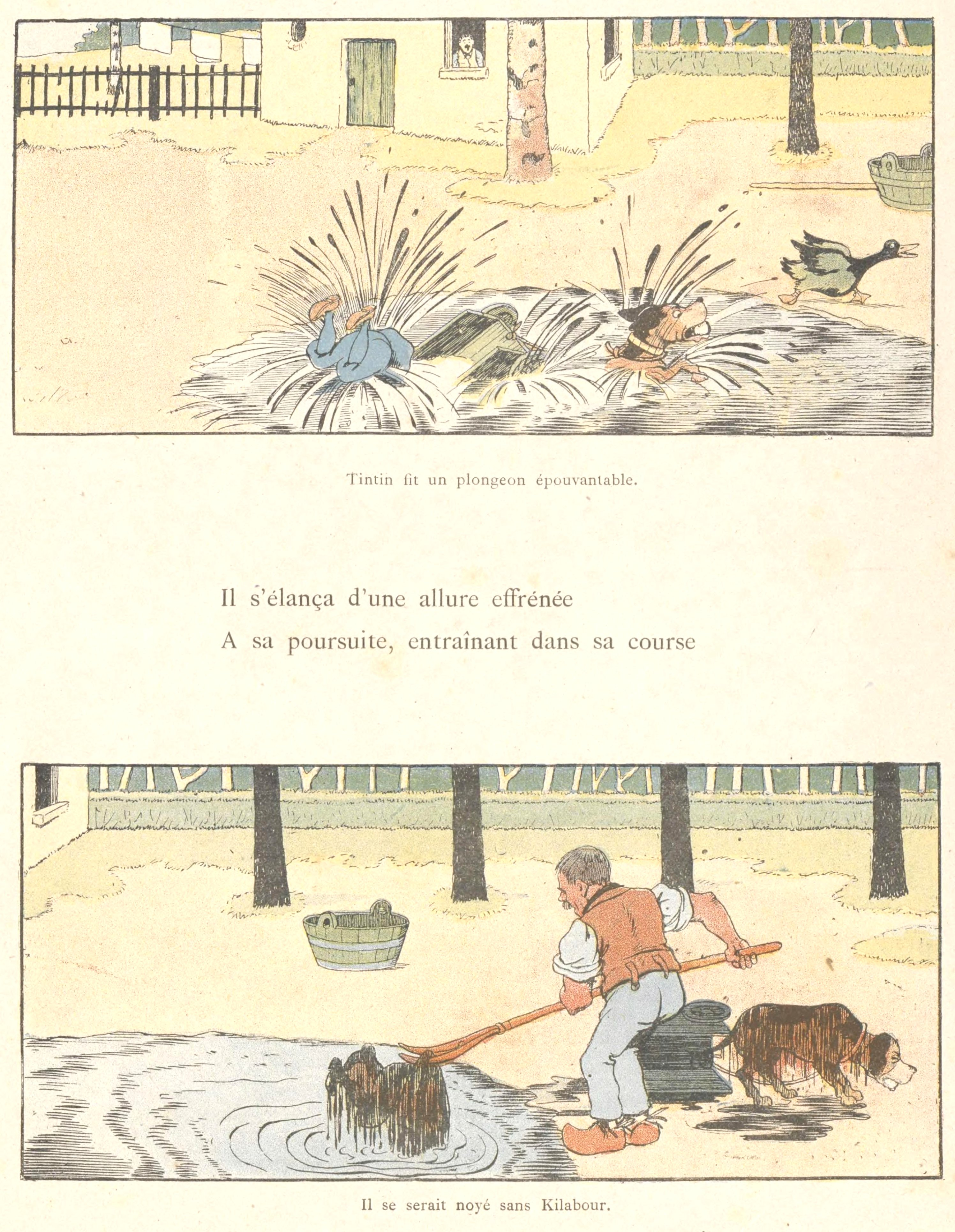 Benjamin Rabier et Fred Isly, Tintin-Lutin, 1898. L'attelage du chien-2.